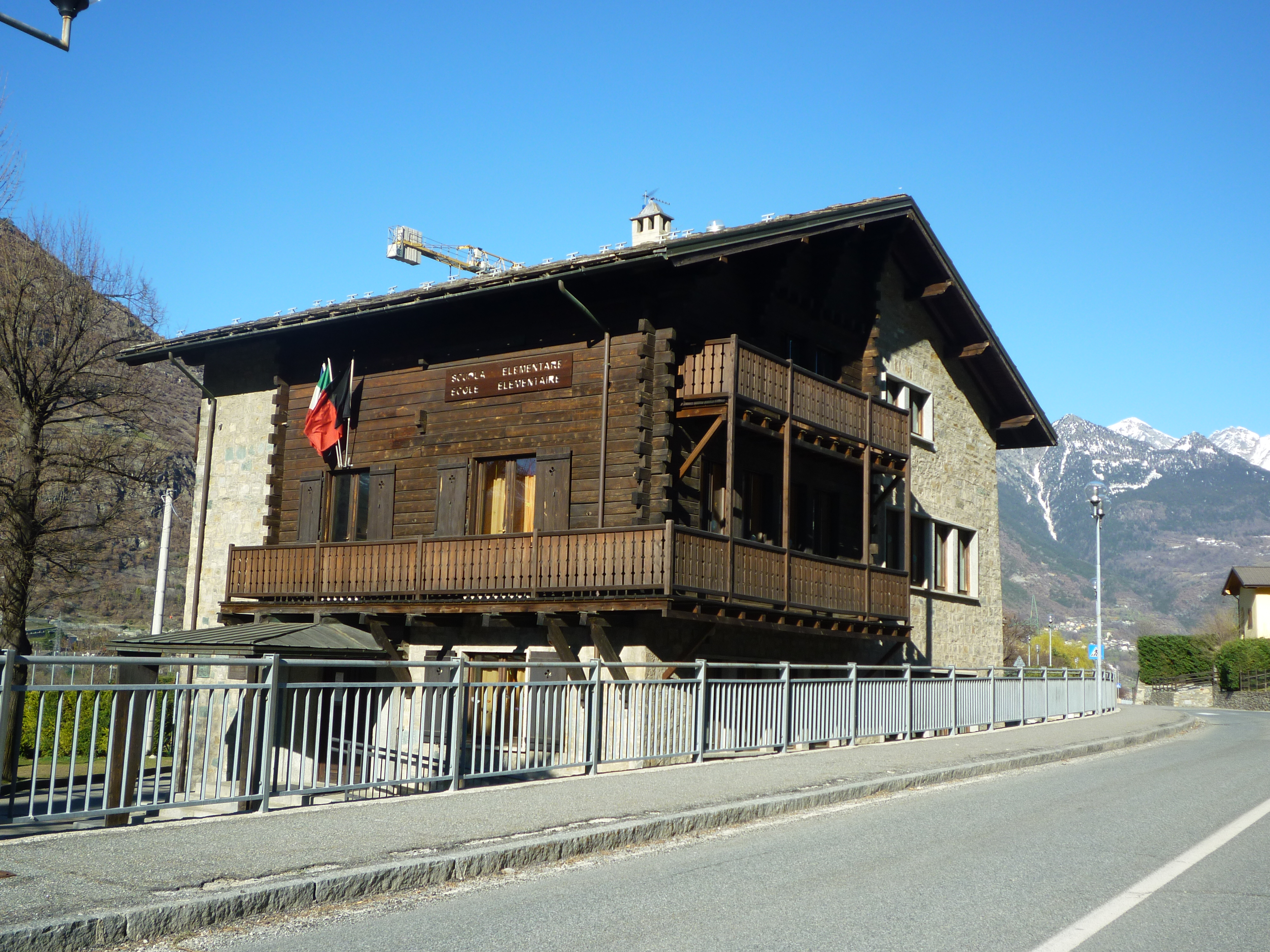 Ecole élémentaire à Pontey